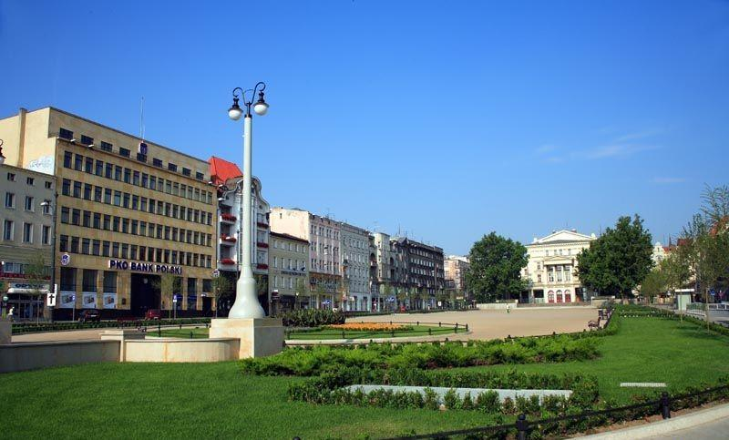 Polska by Ewa and Marek Wojciechowsy